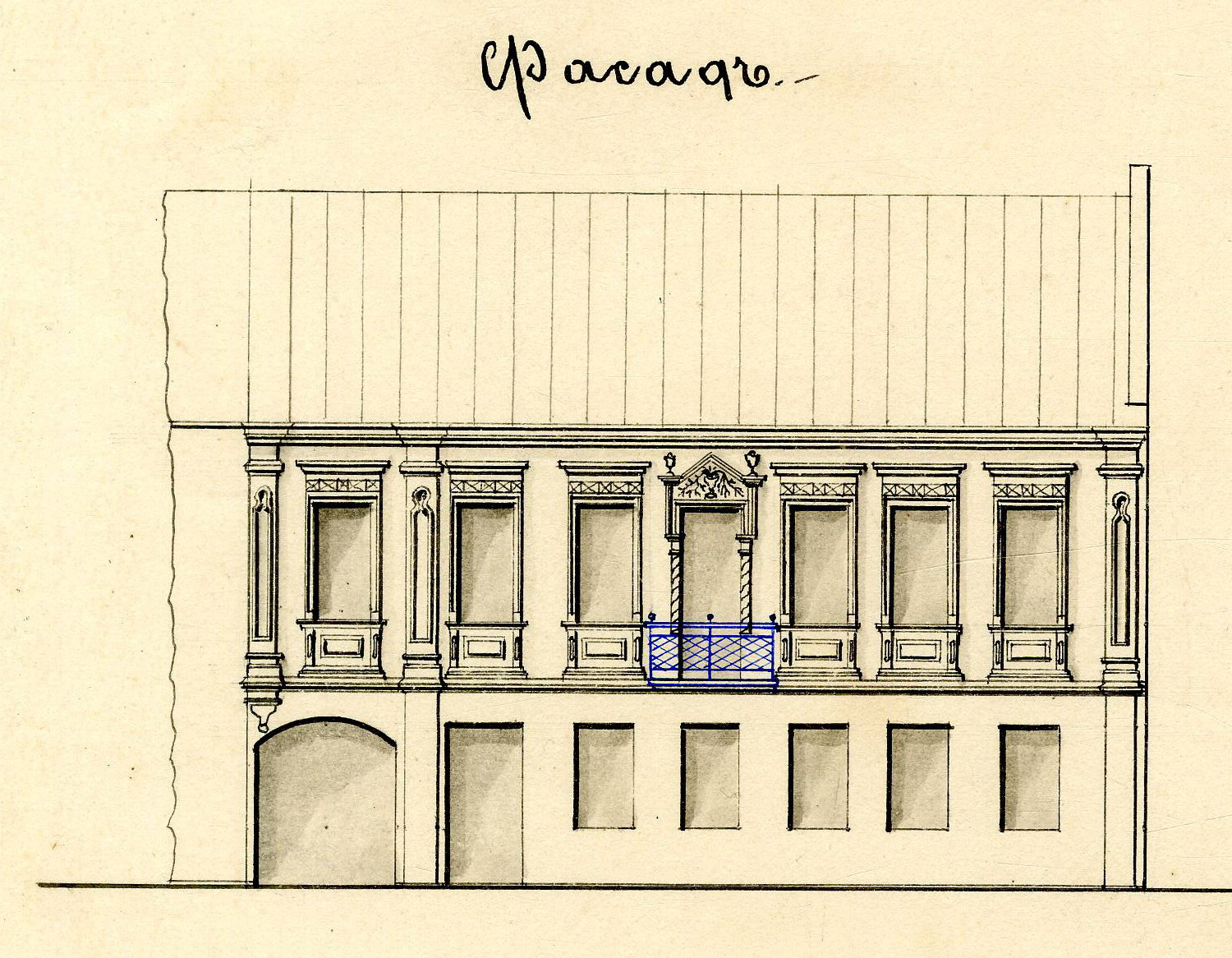 Беларуская (тарашкевіца): Менск (Miensk), вуліца Зборавая (vulica Zboravaja). Дом Мазо (Mazo)